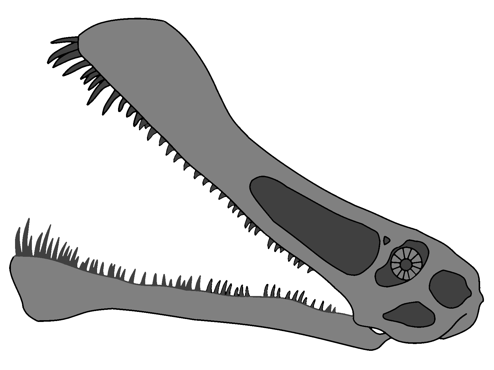 Реконструкция черепа Maaradactylus kellneri